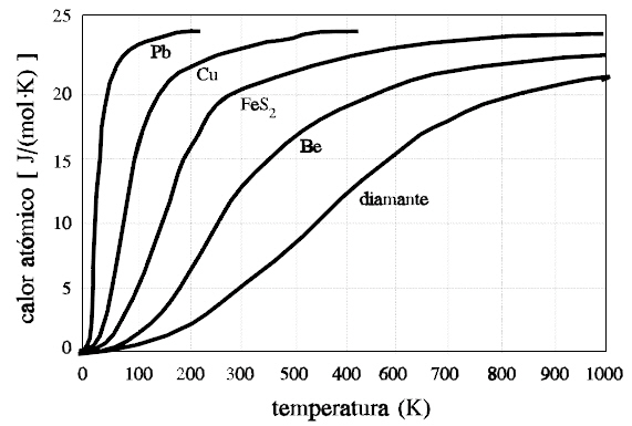 Calor específico de solidos. Ley de Dulong y Petit